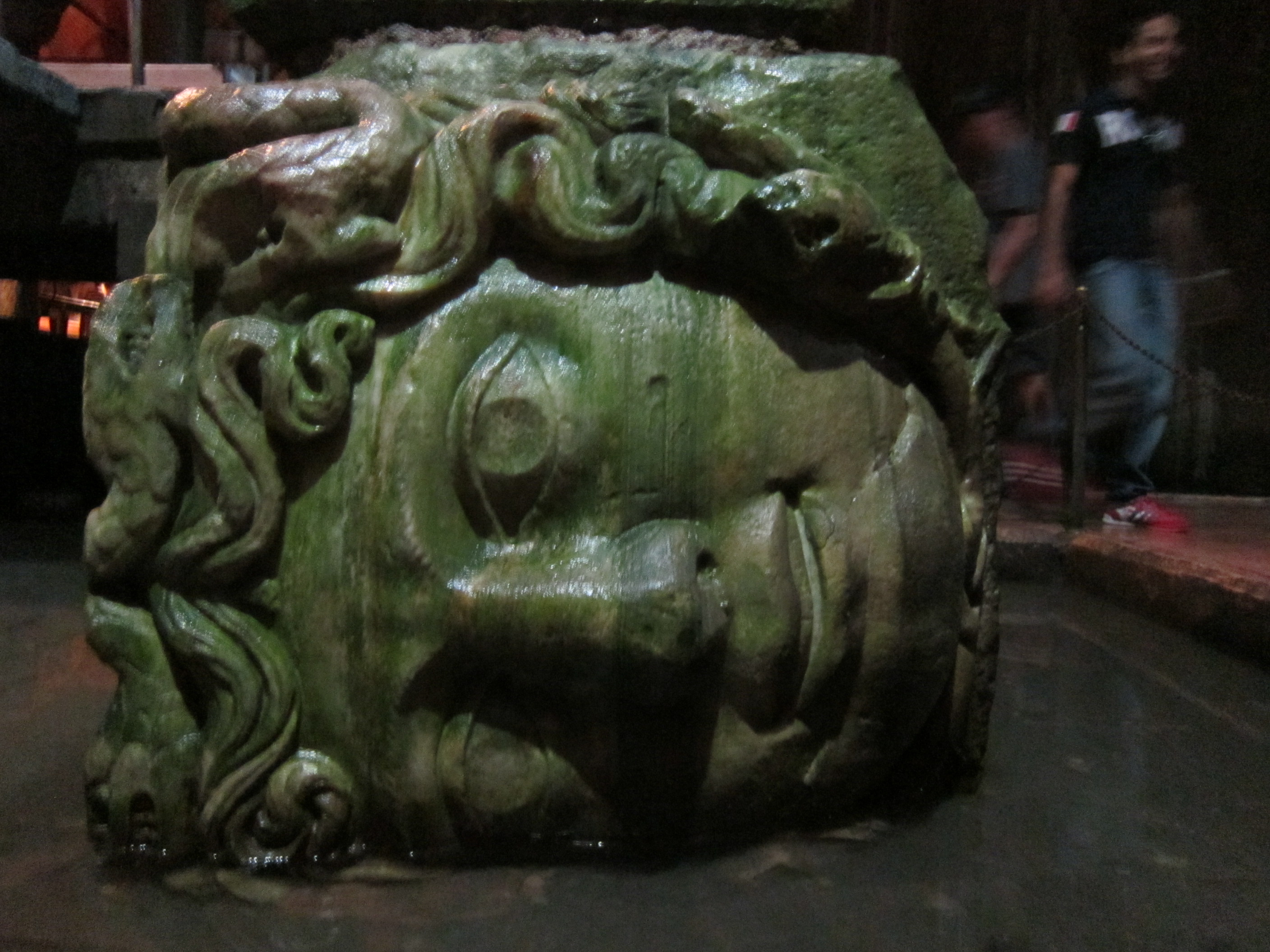 側躺的梅杜莎頭像被當作石柱底下的支撐